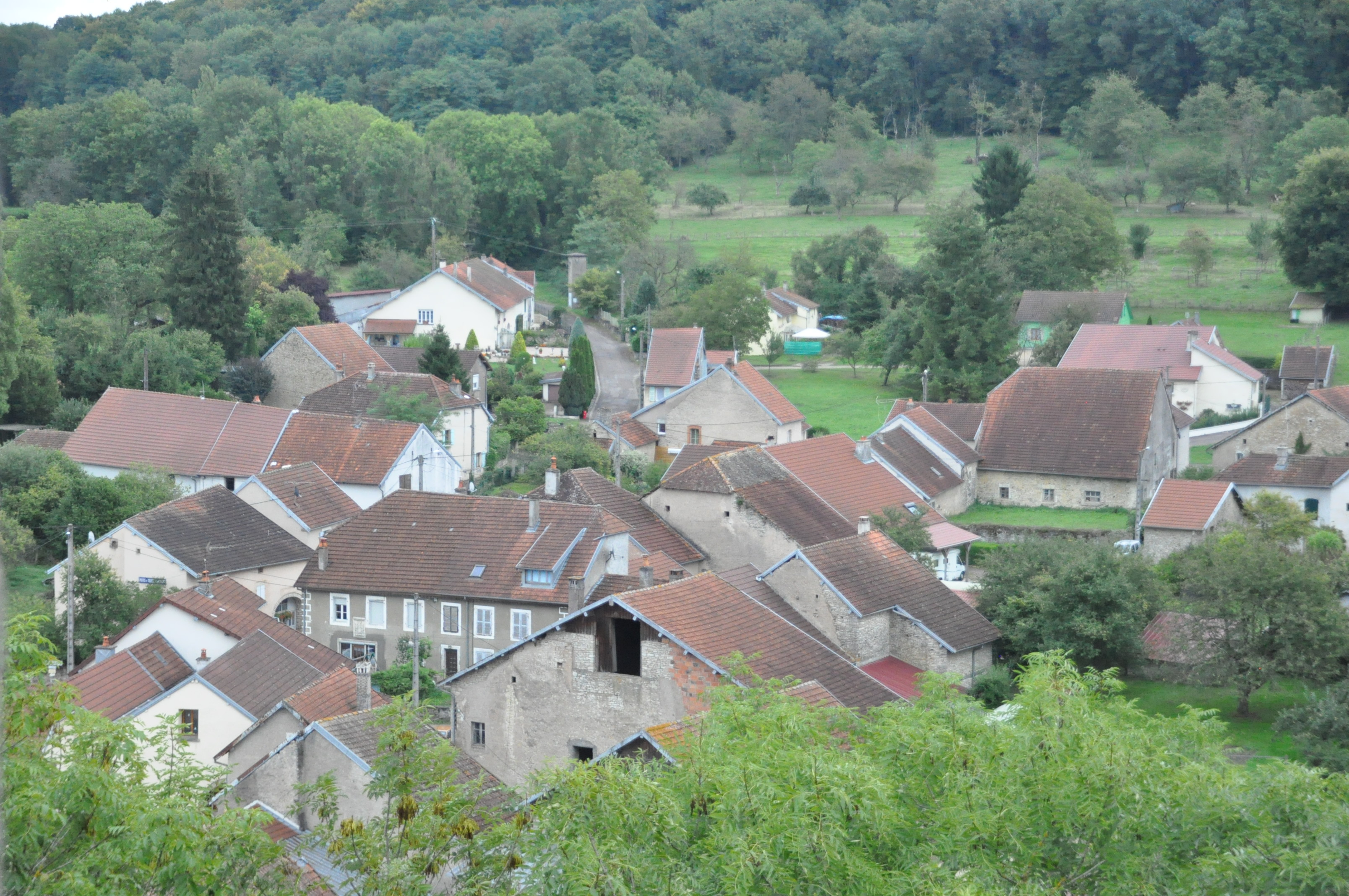 Vue générale de Vallerois-le-Bois (Haute-Saône) depuis la donjon du château